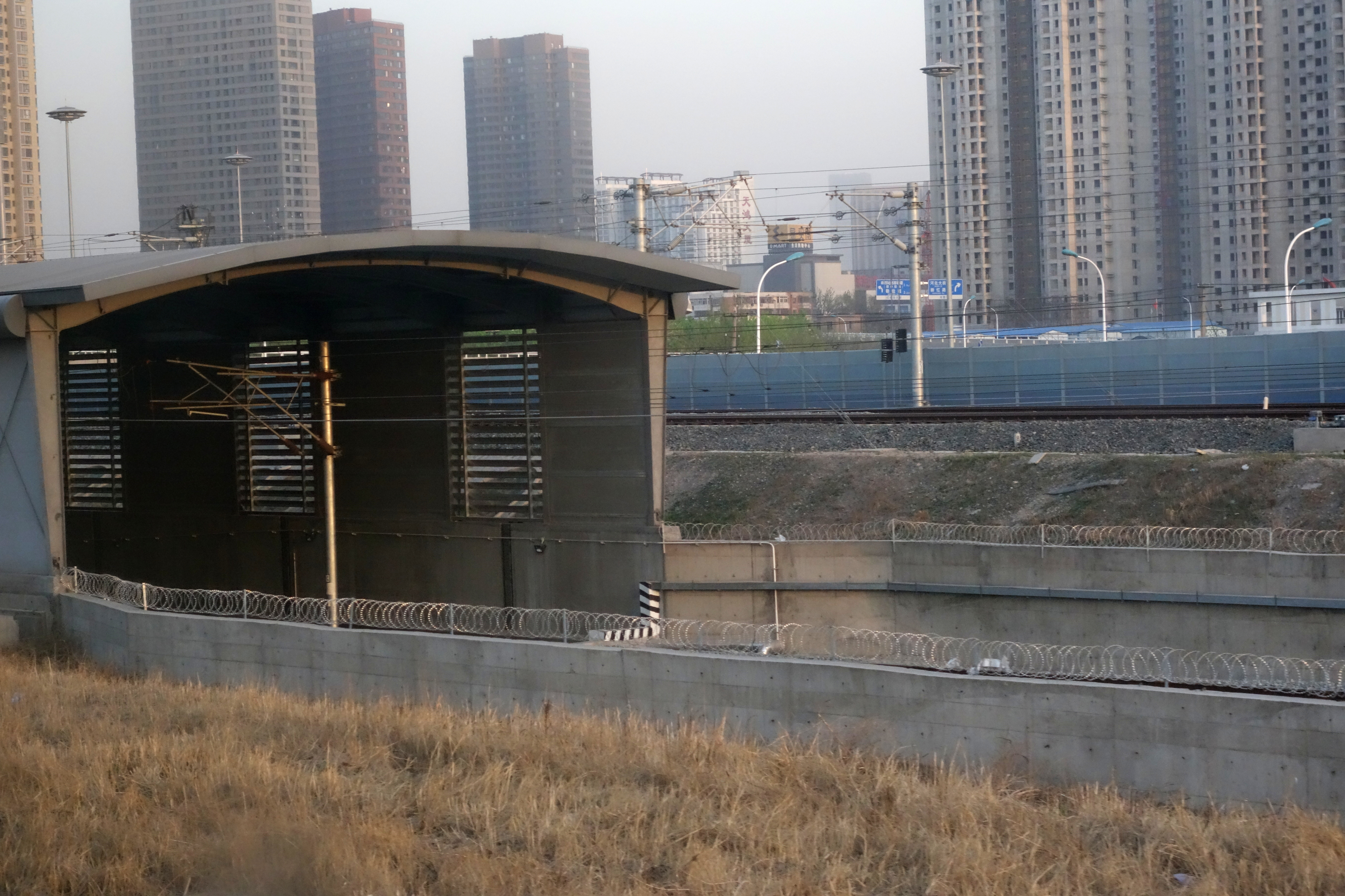 天津西站地下直径线入口